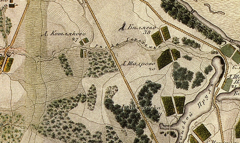 Деревни Котляково и Беляево на топографической карте окружностей Москвы, снятой Офицерами Квартирмейсерской части в 1818 г.